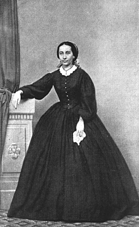 Fráter Erzsébet 1827. július 20-án született Csécsén, Fráter József és sarudi Battik Luca házasságából. Apja abba az ippi, érkeserüi és bélmezei Fráter családba született, amelynek egyik legismertebb tagja Fráter (Martinuzzi) György volt. 1845. július 20-án Madách Imre felesége lett.